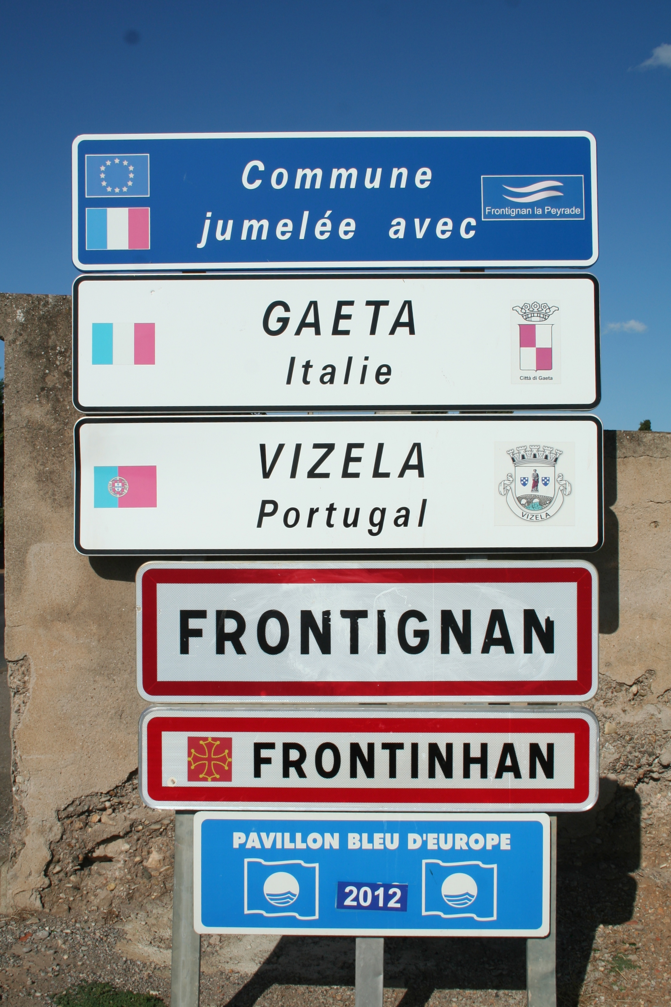 Frontignan (Hérault) - panneau d'entrée (bilingue : français, occitan)